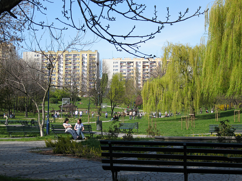 Nowa Huta osiedle Tysiąclecia - Park